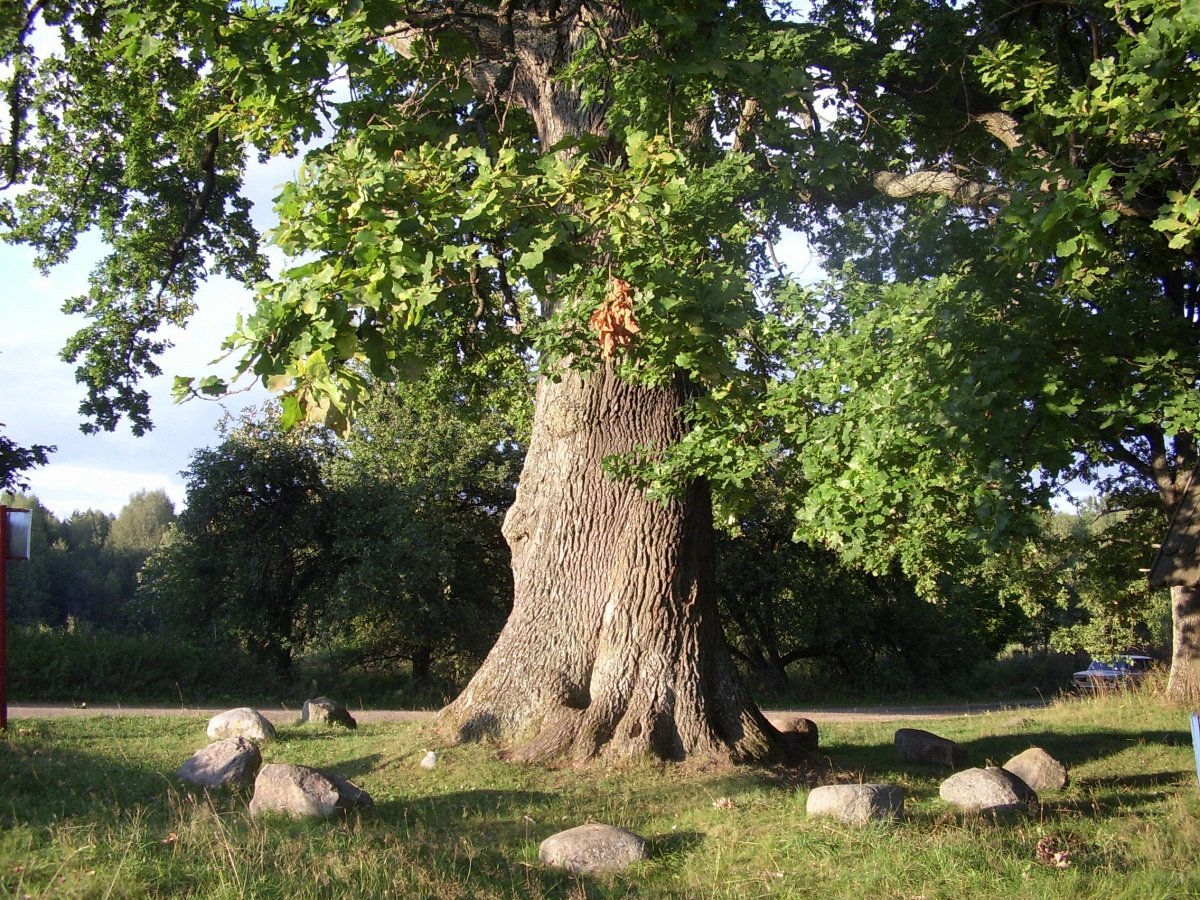 Тадуліна. Цар-дуб